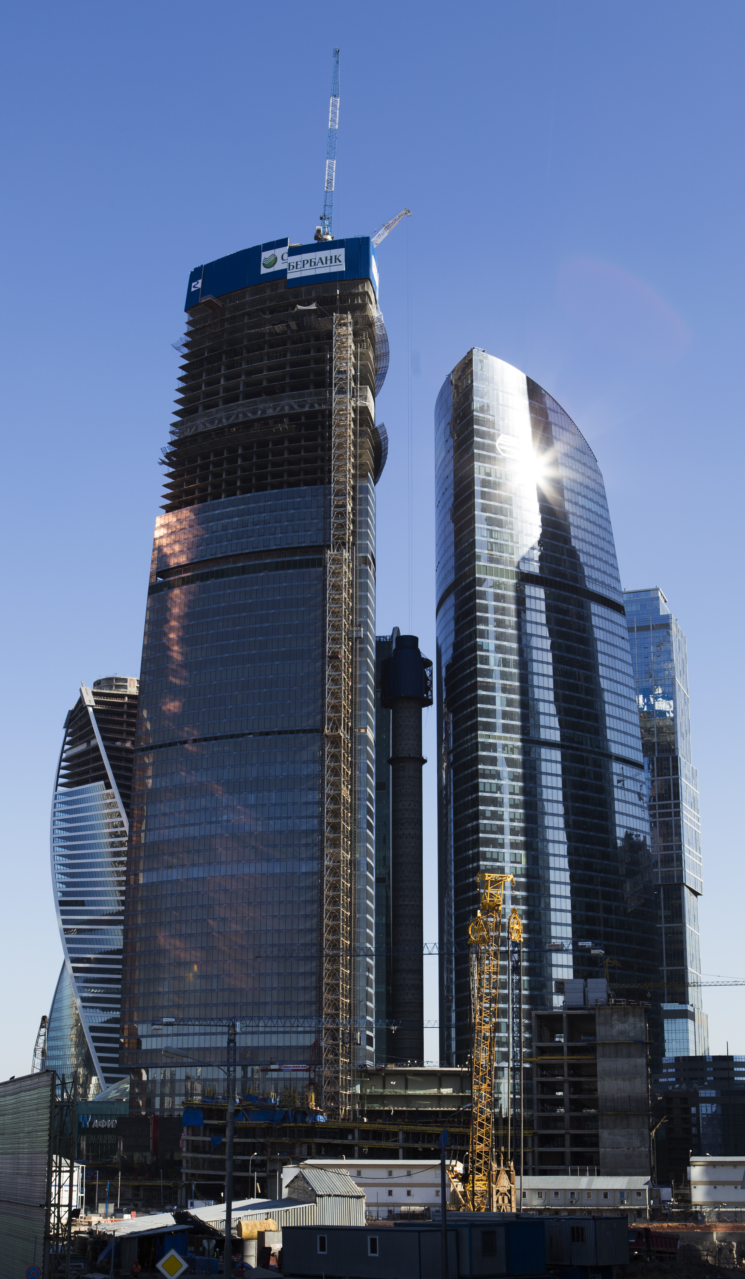 Ход строительства башни "Федерация"